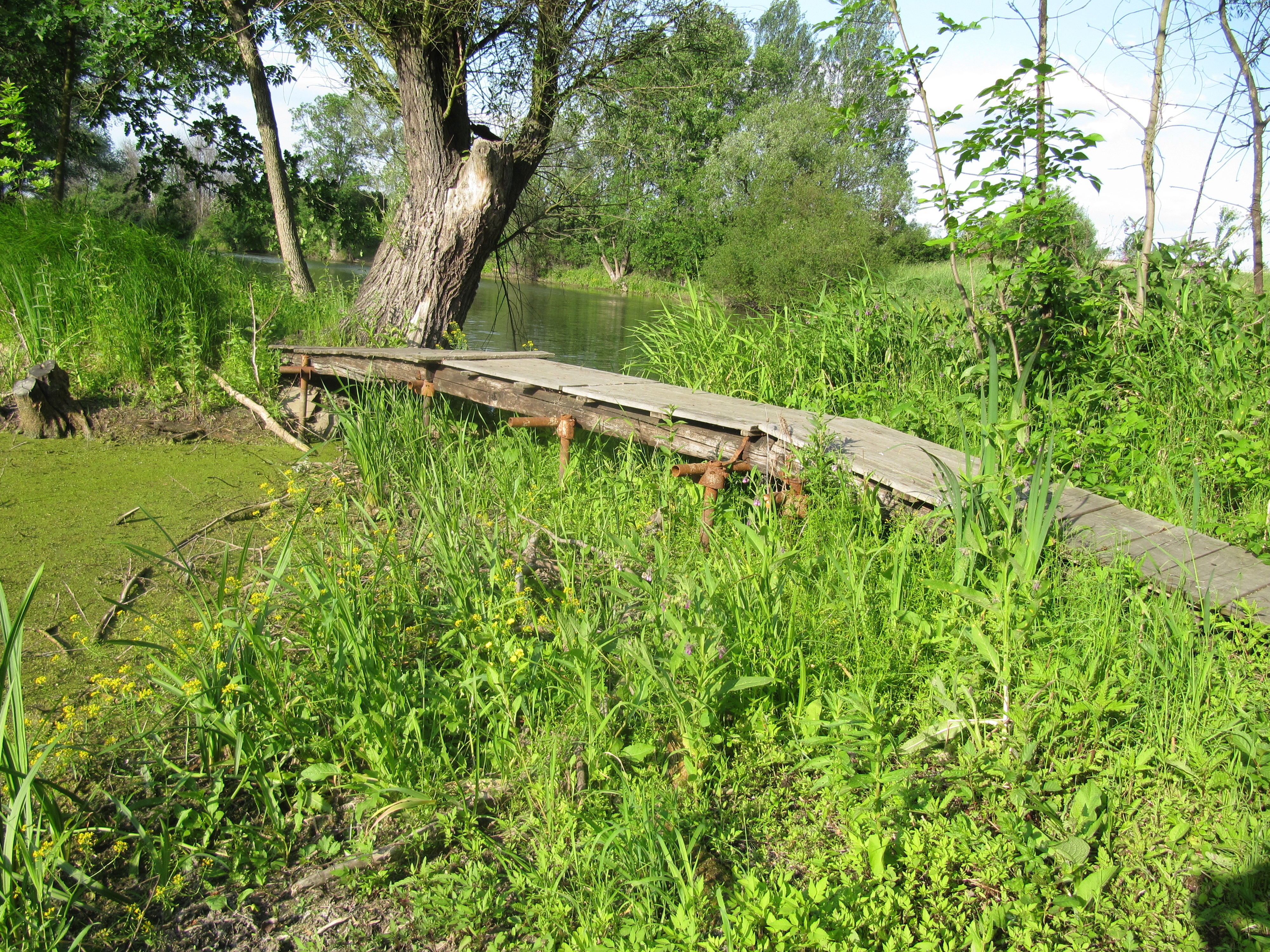 Na letišti